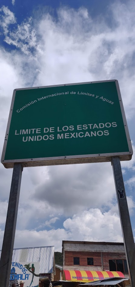 Fita fronterera que marca el limit de Mèxic, aprop de Guatemala